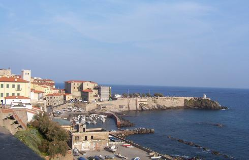 Piazza Bovio, il faro, la Marina e l'Ospedale vecchio